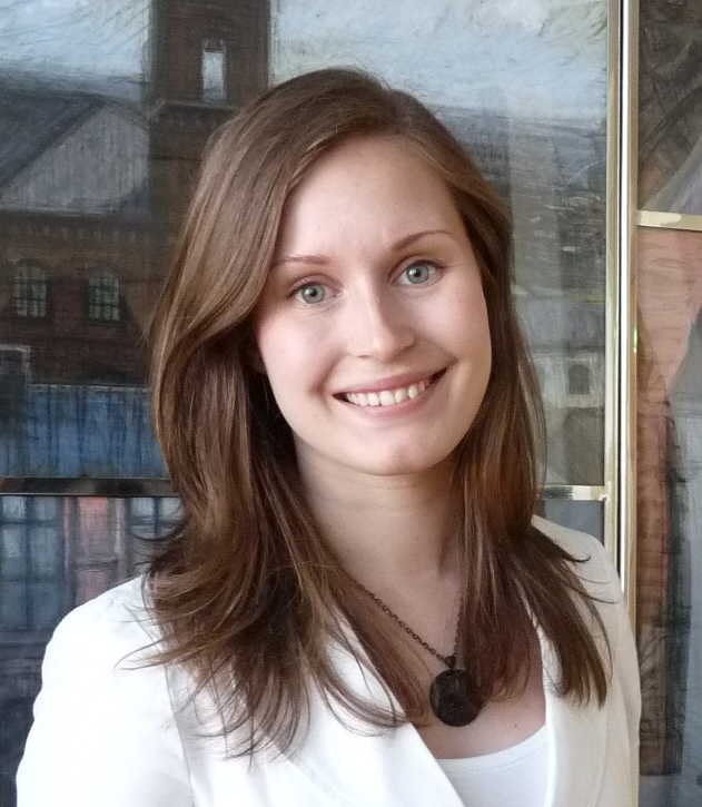 Sanna Marin, Tampereen kaupunginvaltuuston puheenjohtaja 2013–16